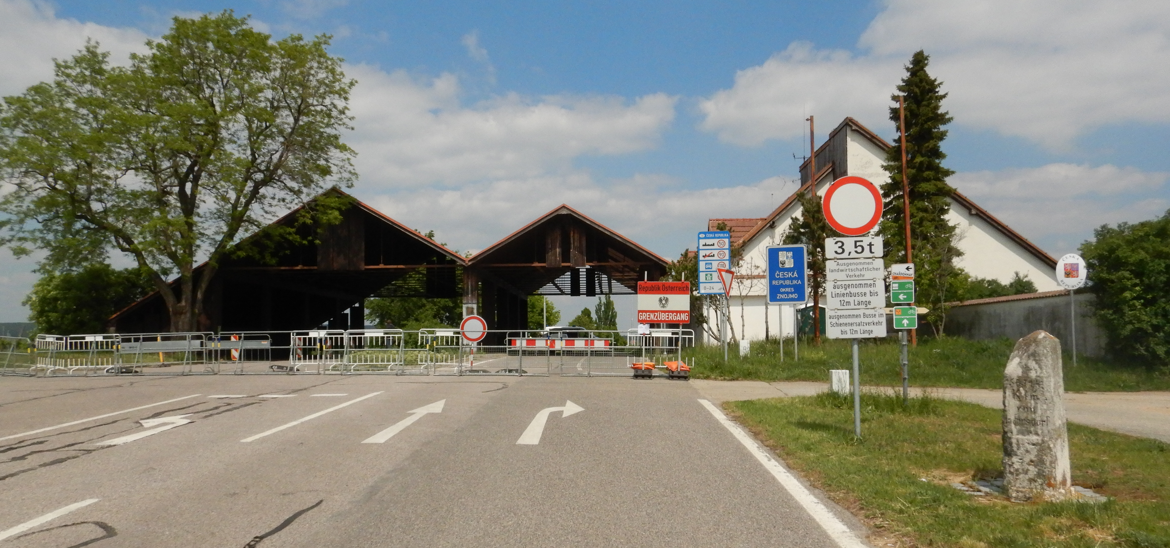 Der wegen der COVID-19-Pandemie von der Tschechischen Republik gesperrte Grenzübergang zwischen Mitterretzbach (Niederösterreich) und Hnanice / Gnadlersdorf (Cz). Am 16. Mai 2020 fand hier eine Demonstration zur Grenzöffnung statt.